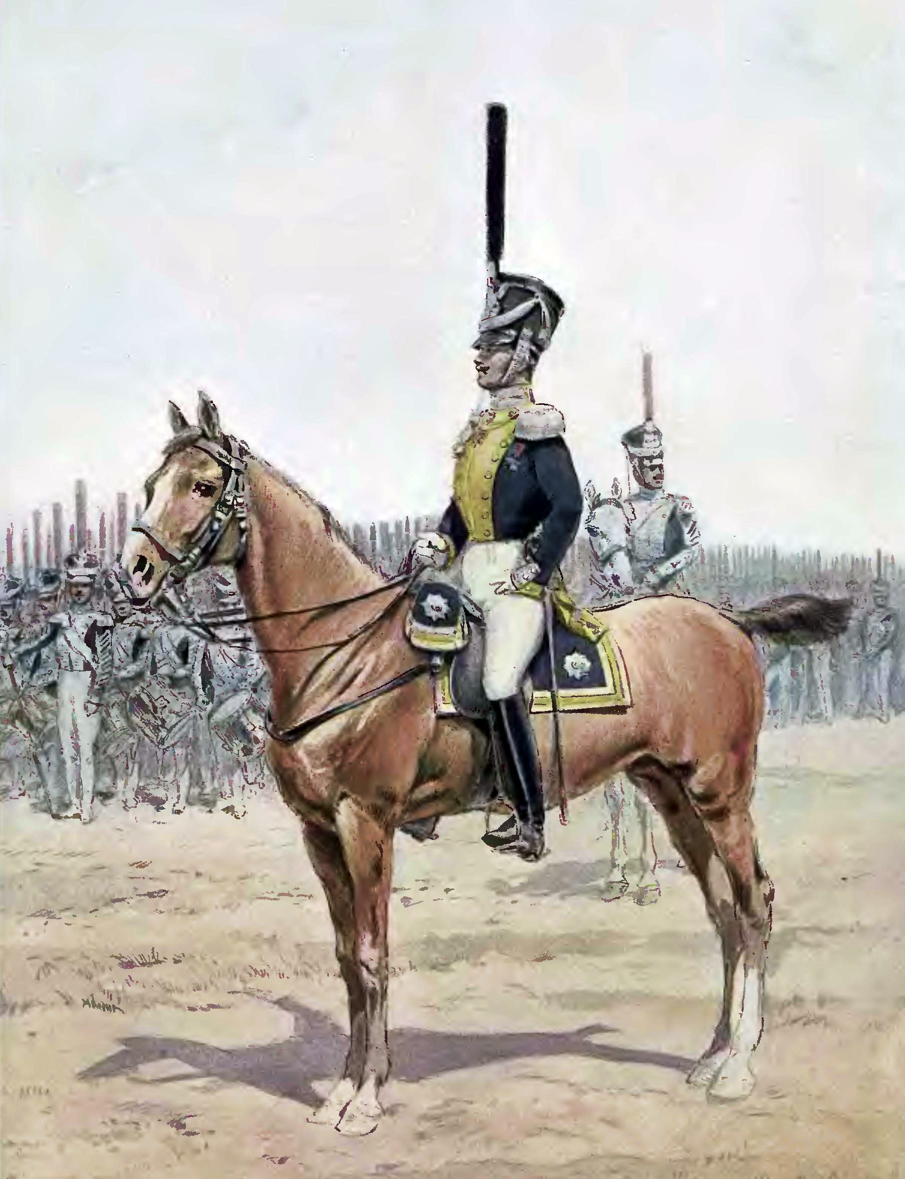 Grenadierzy gwardii Królestwa Kongresowwgo